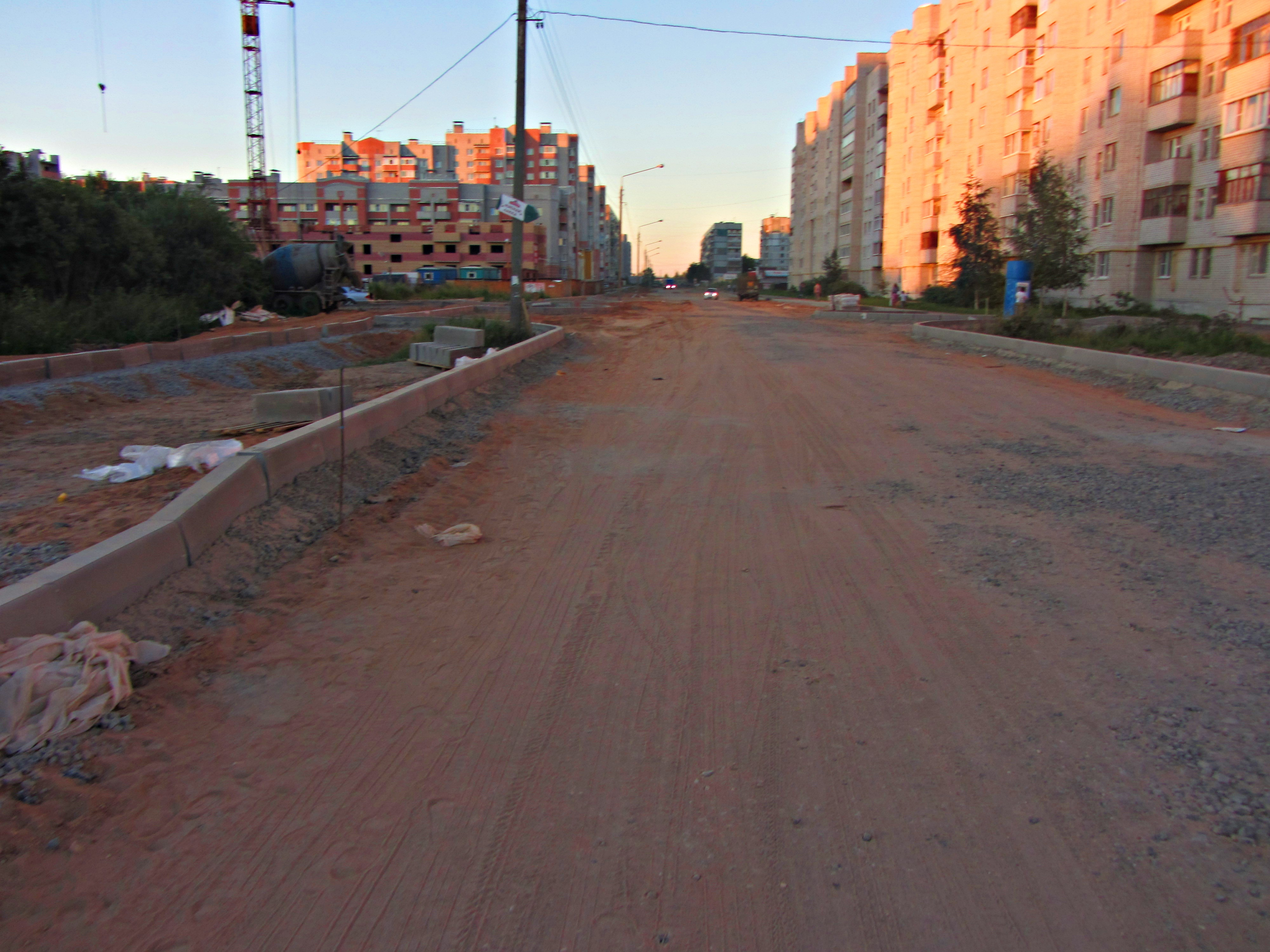 Ремонт ул. Фрязиновской, г. Вологда, июль 2014 года